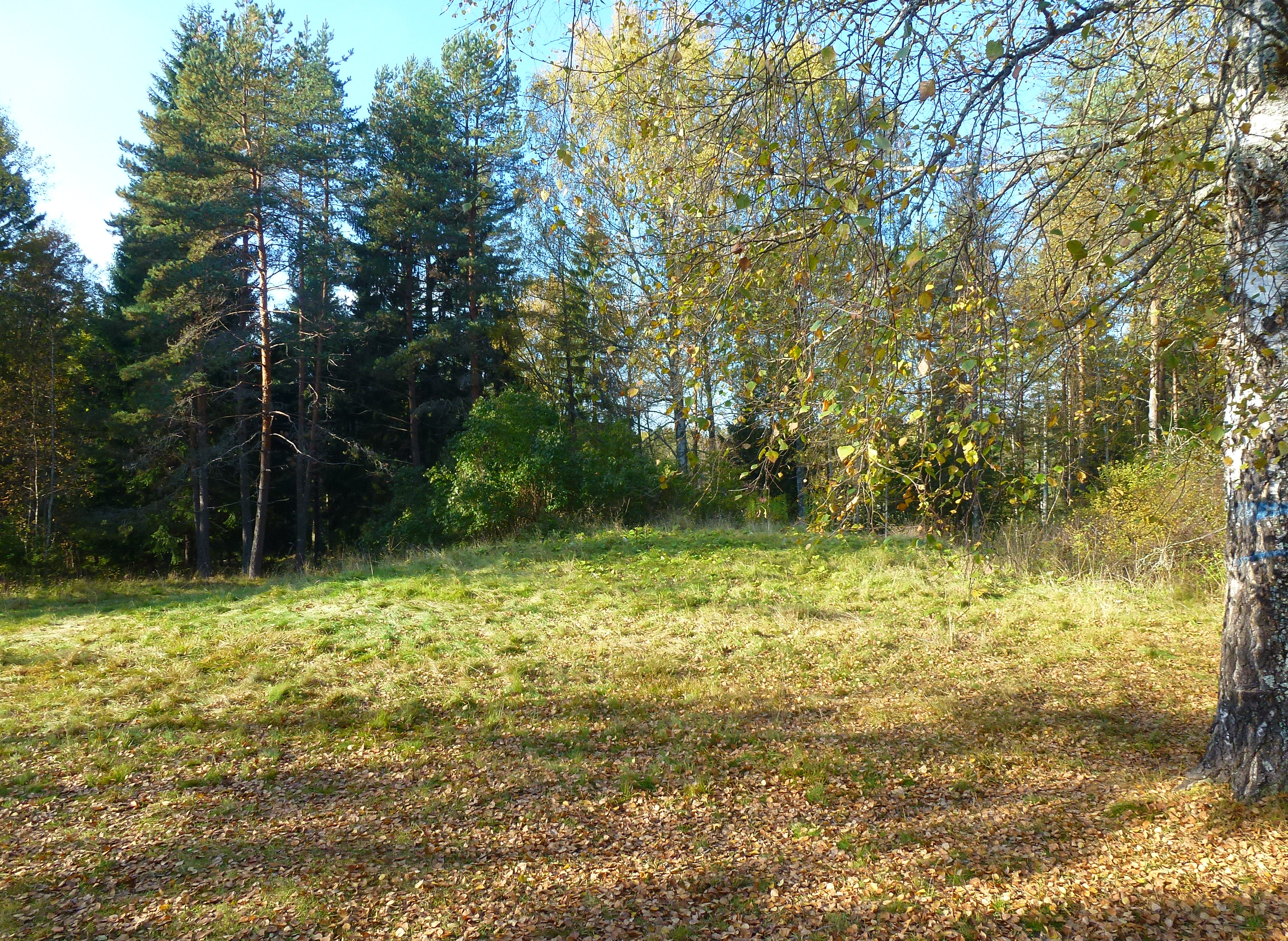 Tuppstugans tomtplats (stugan brändes ner 2004)